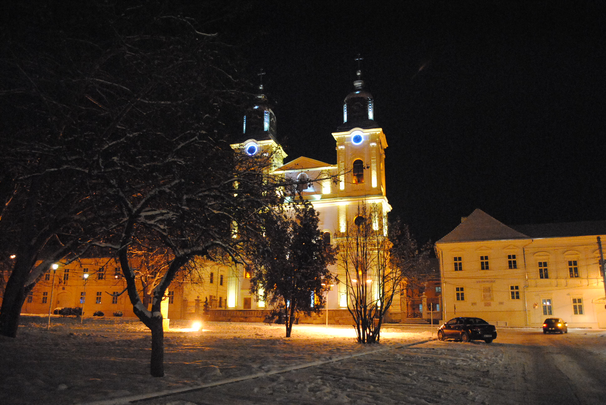 Catedrala greco-catolică "Sf. Treime", 1741 - 1749, ext. 1835- 1842